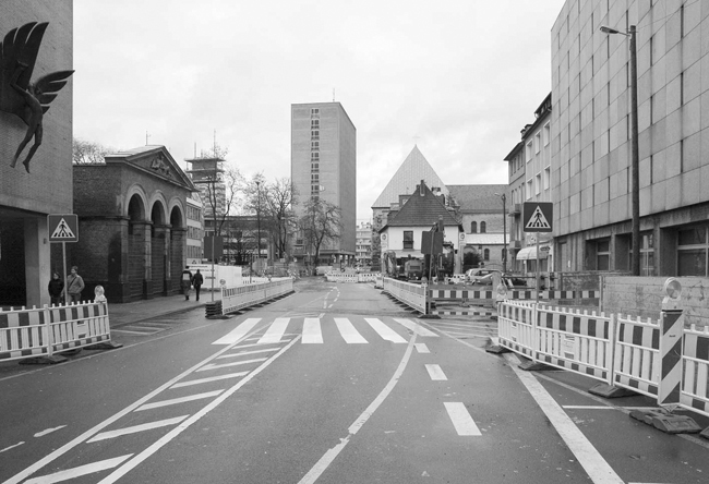 Köln; Waidmarkt; Vorbereitung der Baustelle beim Bau der Nord-Süd-Stadtbahn Köln; 12. Februar 2005. Links das Friedrich-Wilhelm-Gymnasium mit der Bronzeskulptur des Ikarus, daneben die am 9. März 2009 abgerissene Alte Waidmarktwache, in der Mitte das 2011 abgerissene Polizeipräsidium und die romanische Kirche St. Georg, rechts das am 3. März 2009 eingestürzte Archivgebäude.